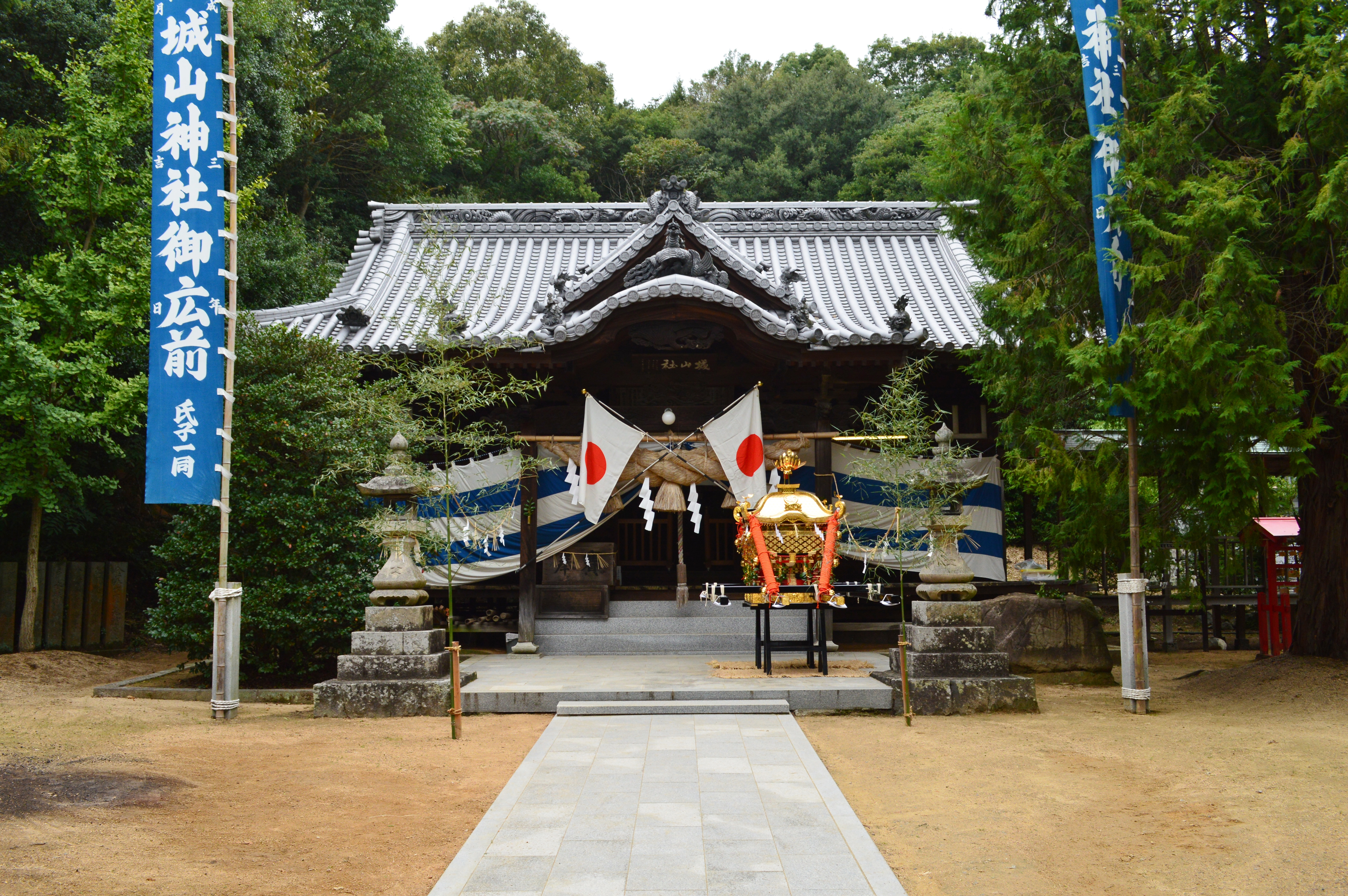 城山神社 (坂出市) 拝殿